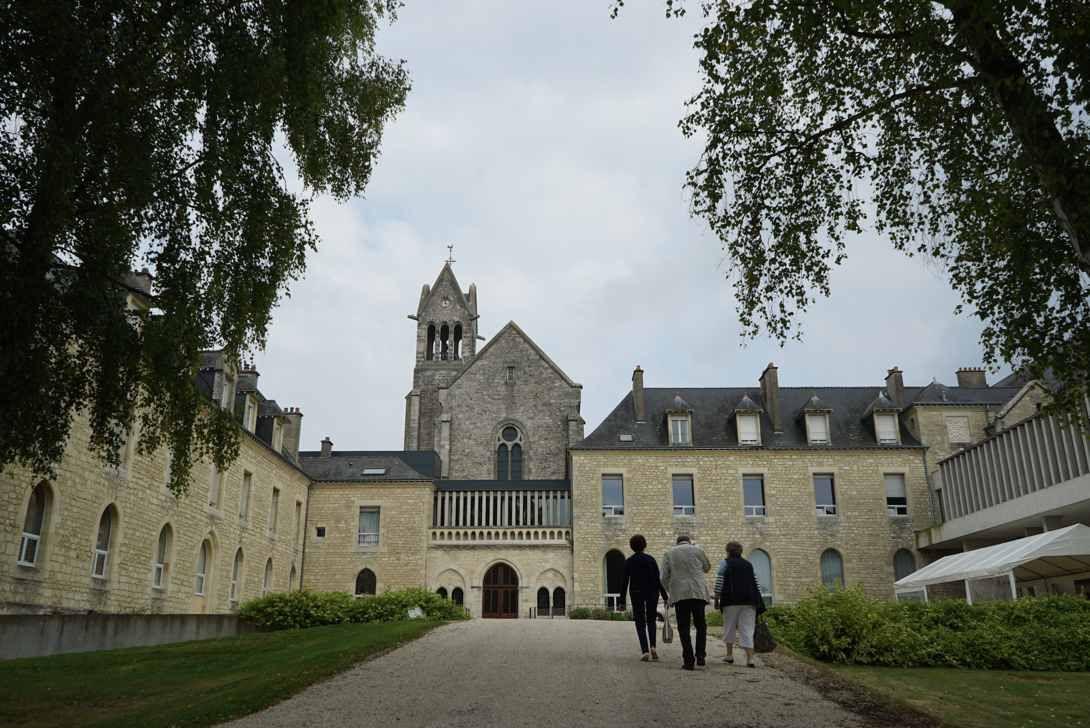 Cour honneur abbaye Igny.